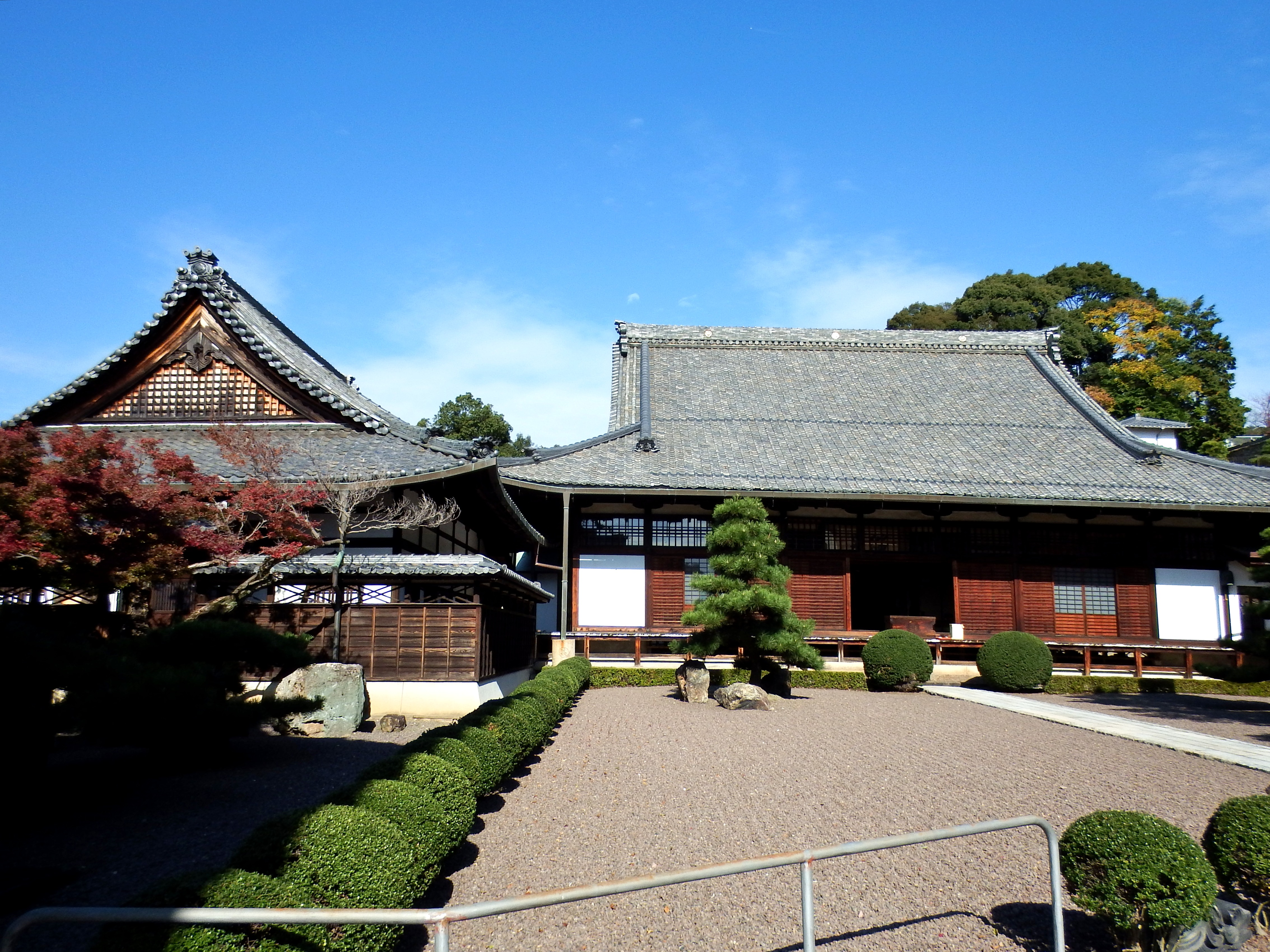 青龍山瑞泉寺